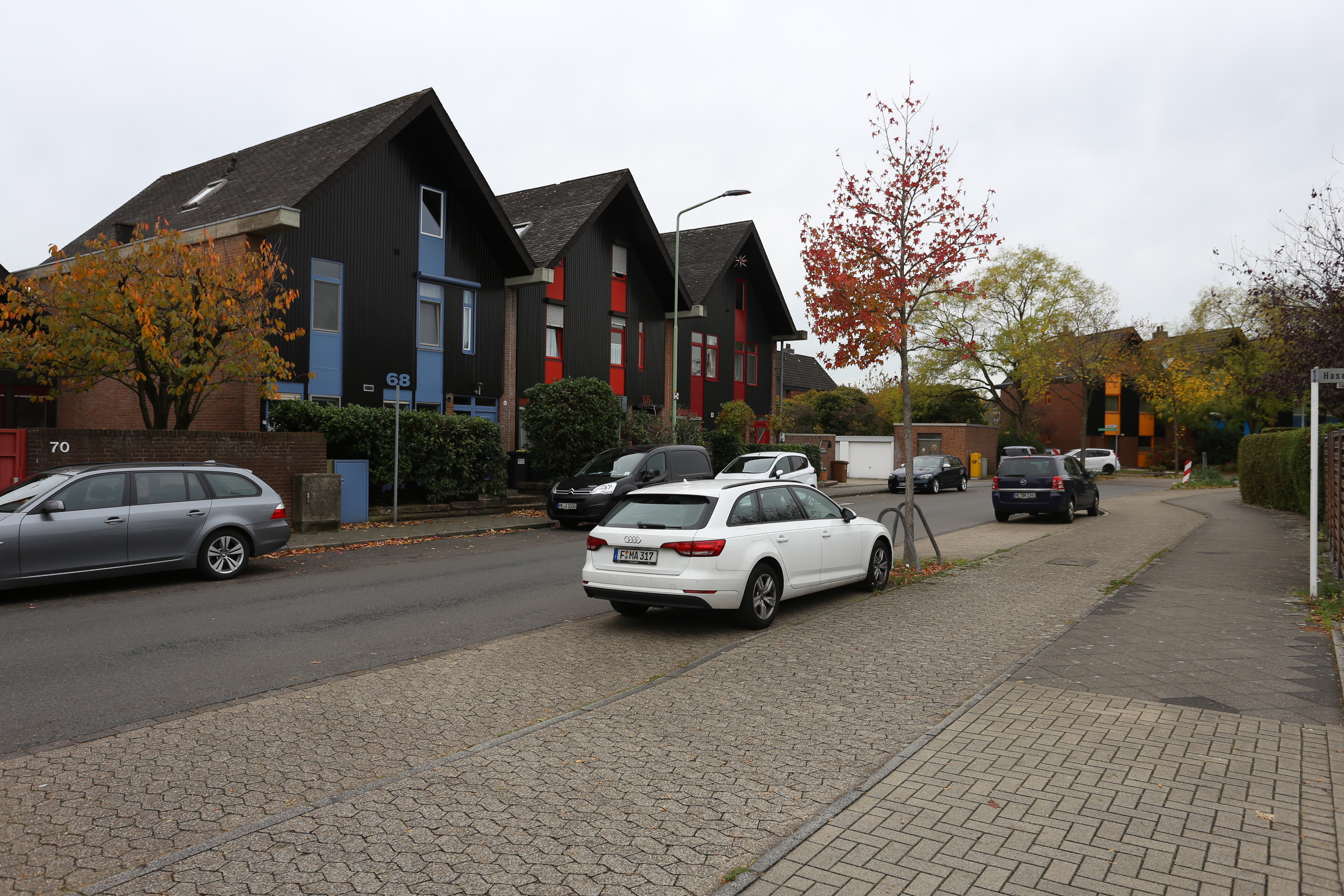 Ratingen West, Sogenannte Grachtenhäuser an der Brandenburger Straße